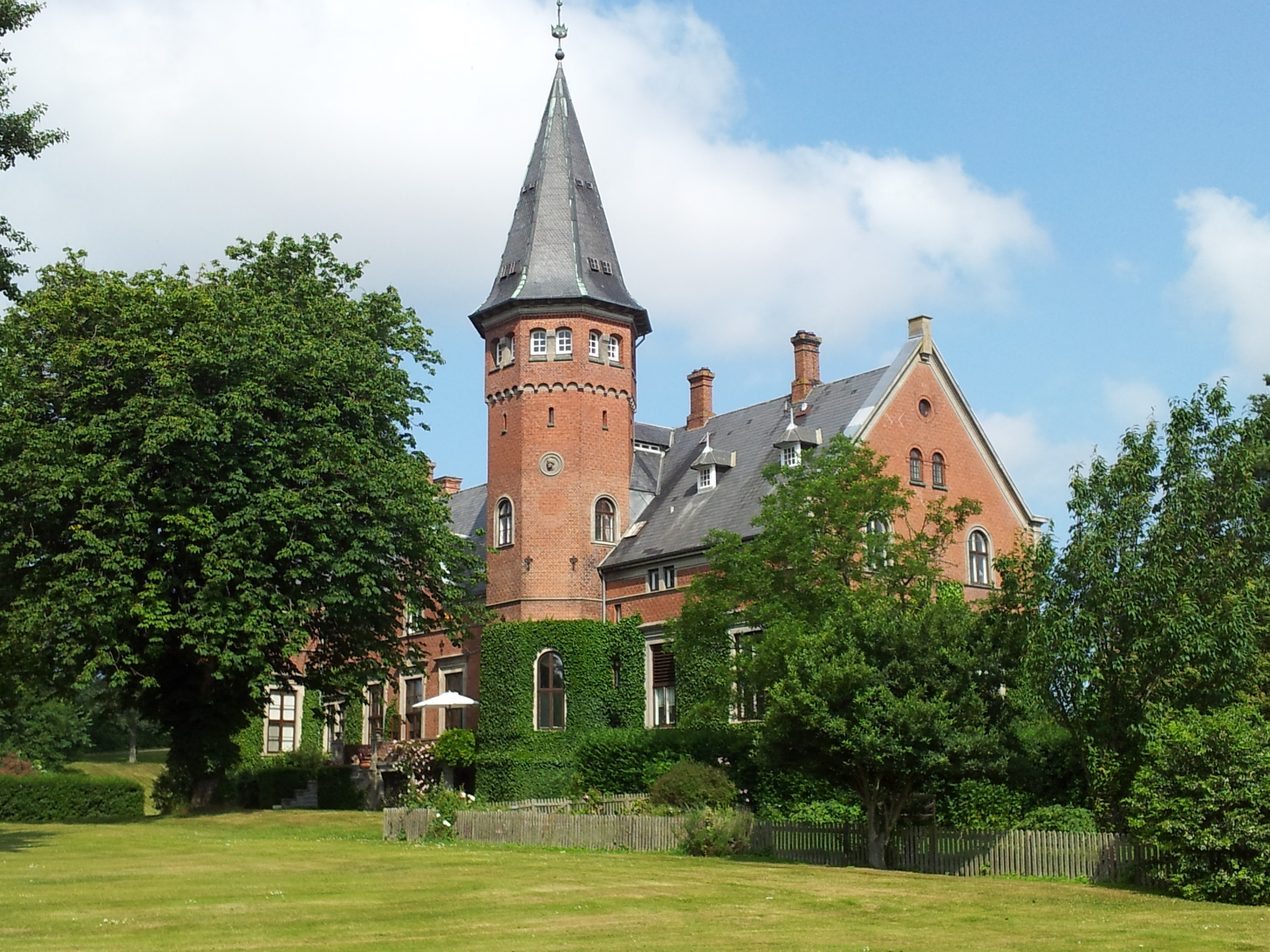 Brattingsborg Gods, Samsø